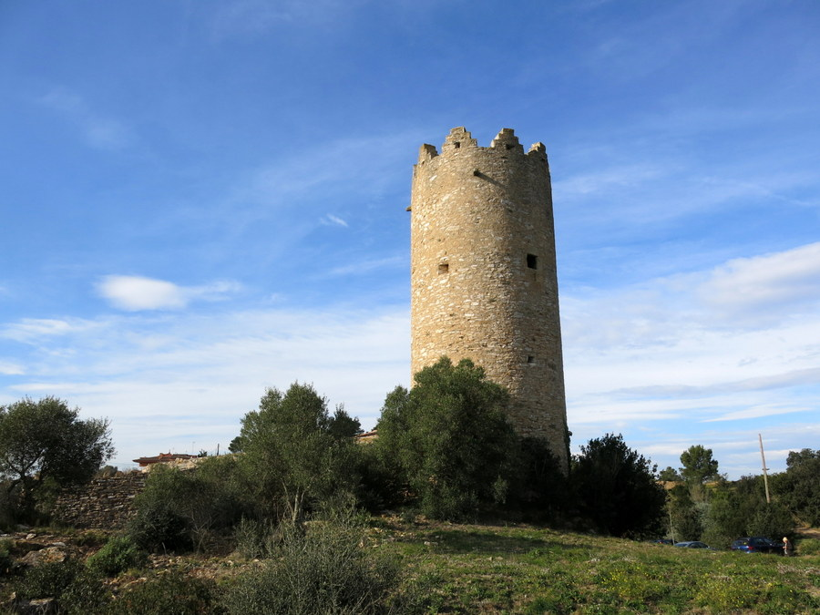 Torre Mas Pinc de Begur - Baix Empordà - Catalunya